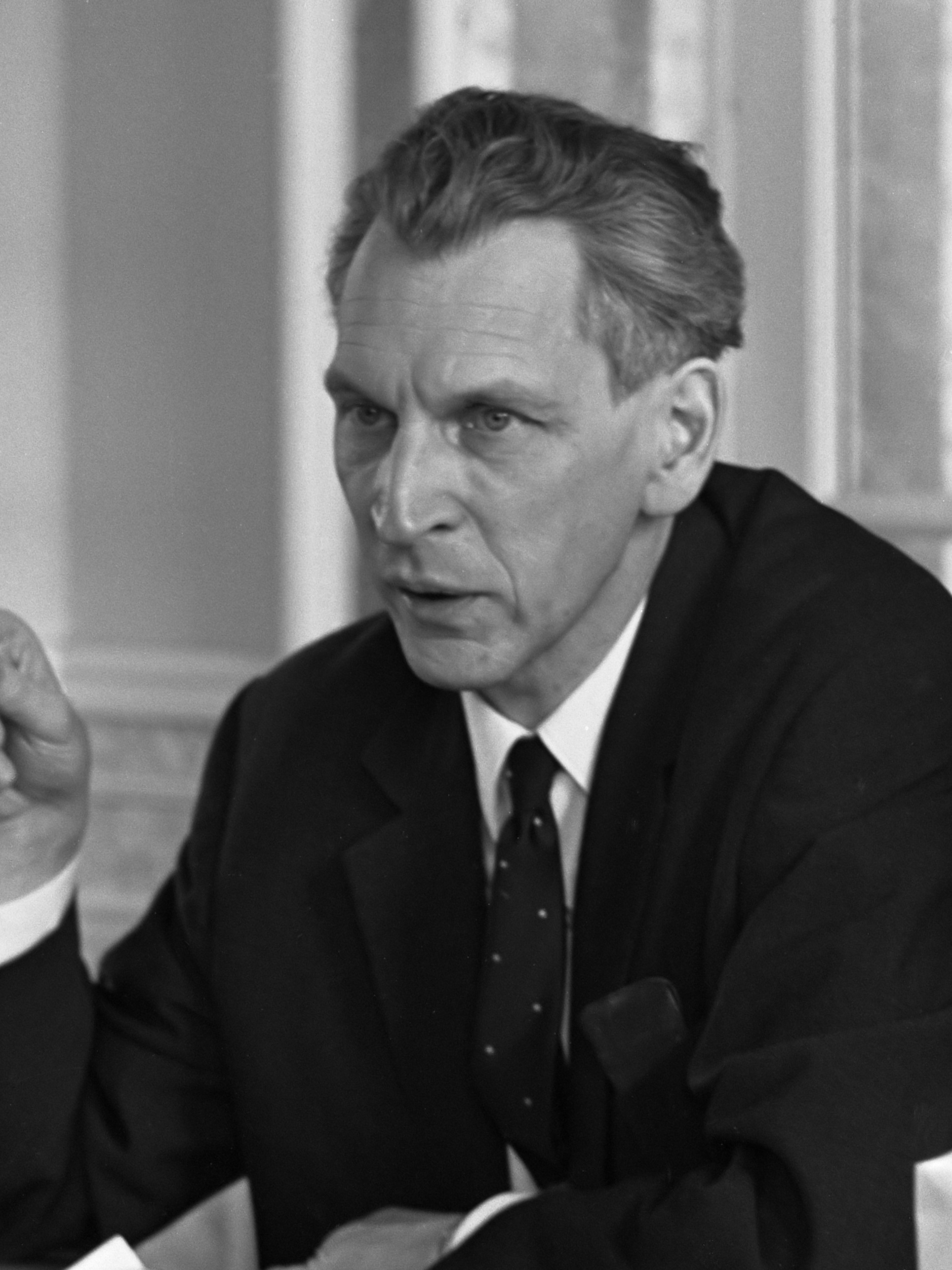 Jaarlijkse persconferentie Nederlandse Orkest-stichting, de heer Marius Flothuis (artistiek leider) 4 april 1967